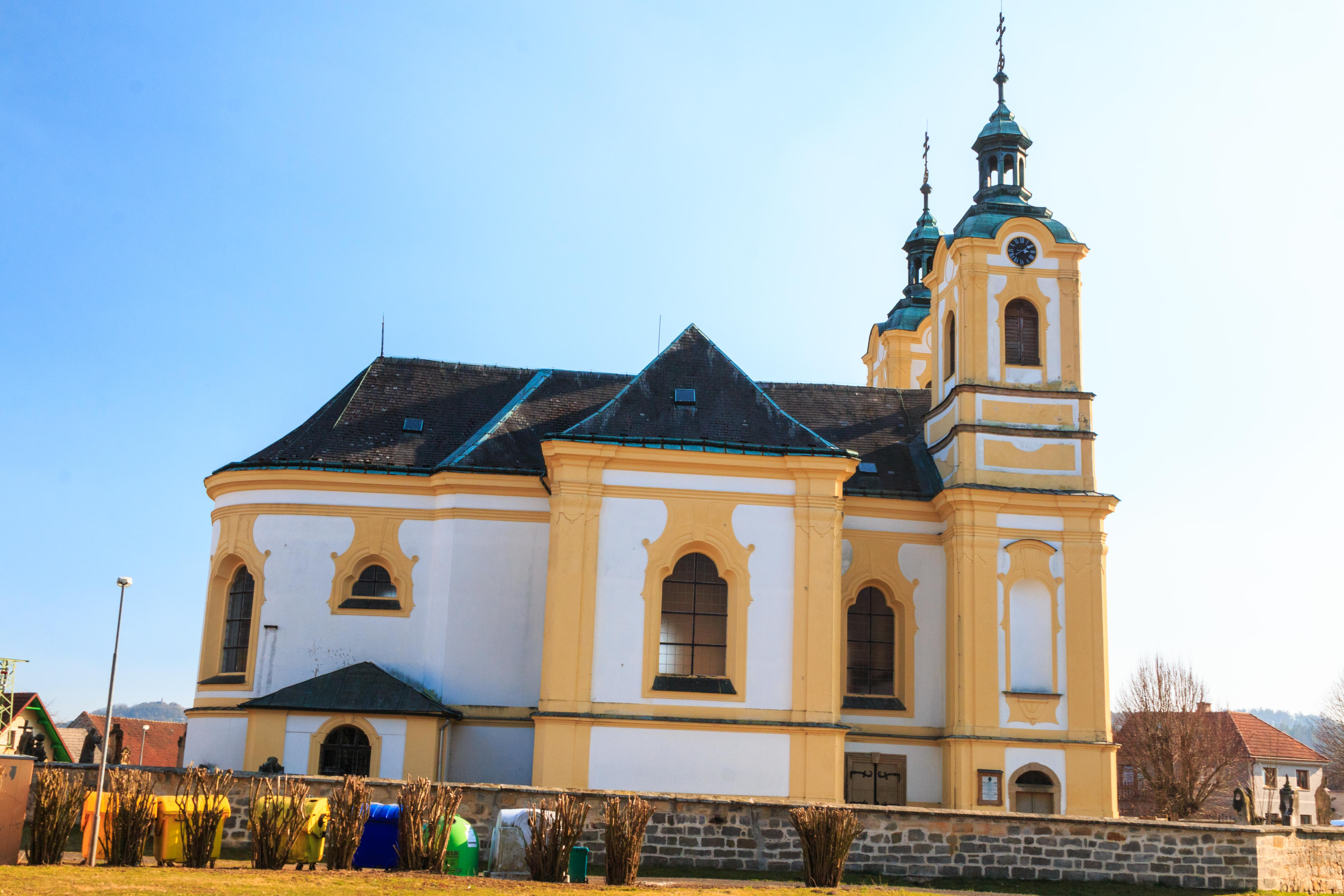 Kostel Povýšení svatého Kříže, Ostružno (okres Jičín).